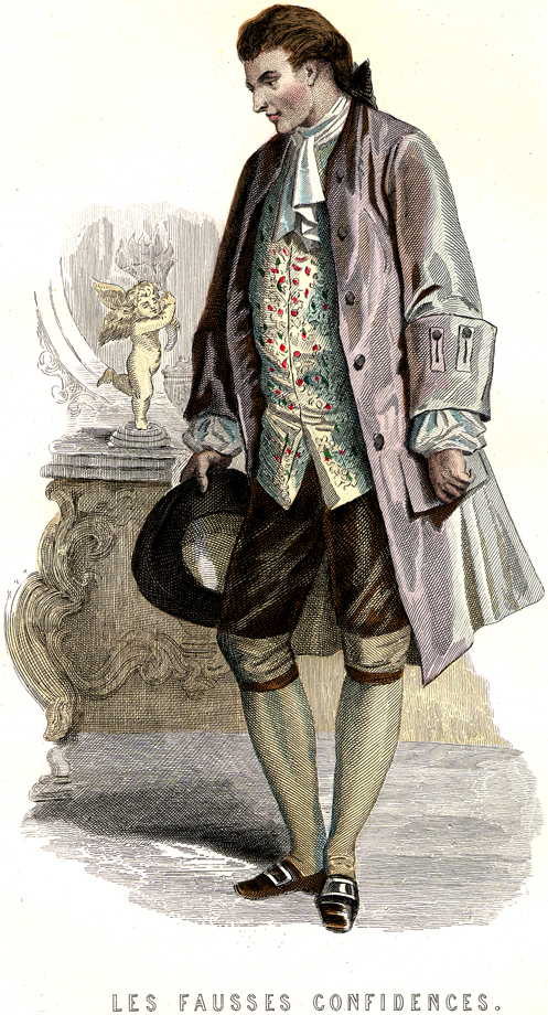 The False Confidences (1738) by Pierre de Marivaux (1688-1763)